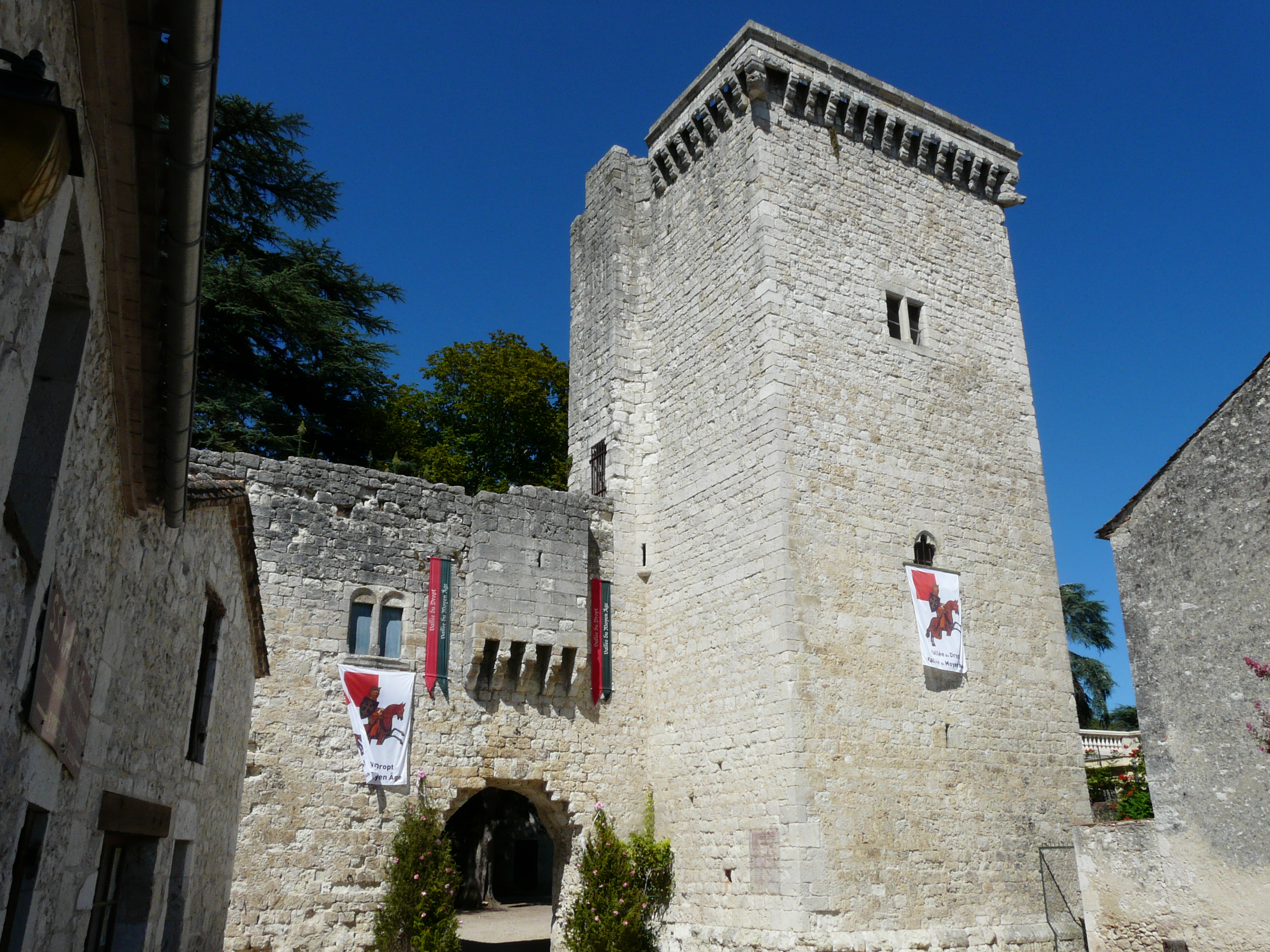 La porte sud et la tour Monseigneur, château d'Eymet, Dordogne, France Object location44° 40′ 05.8″ N, 0° 23′ 48.6″ E